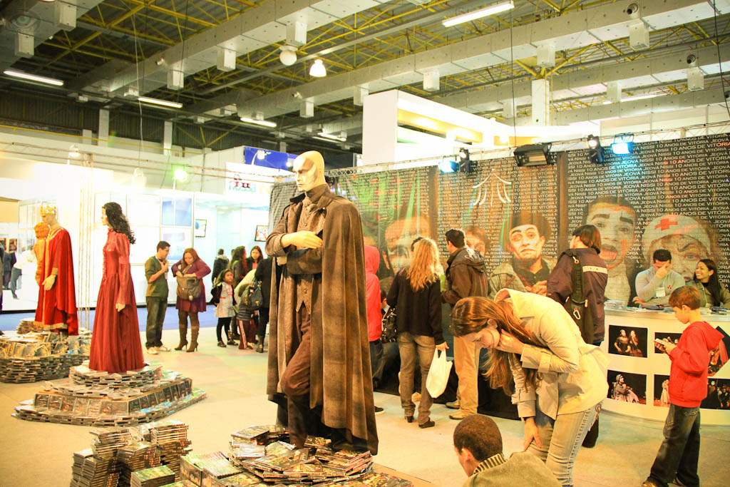 Uma exposição na ExpoCristã em 2010.